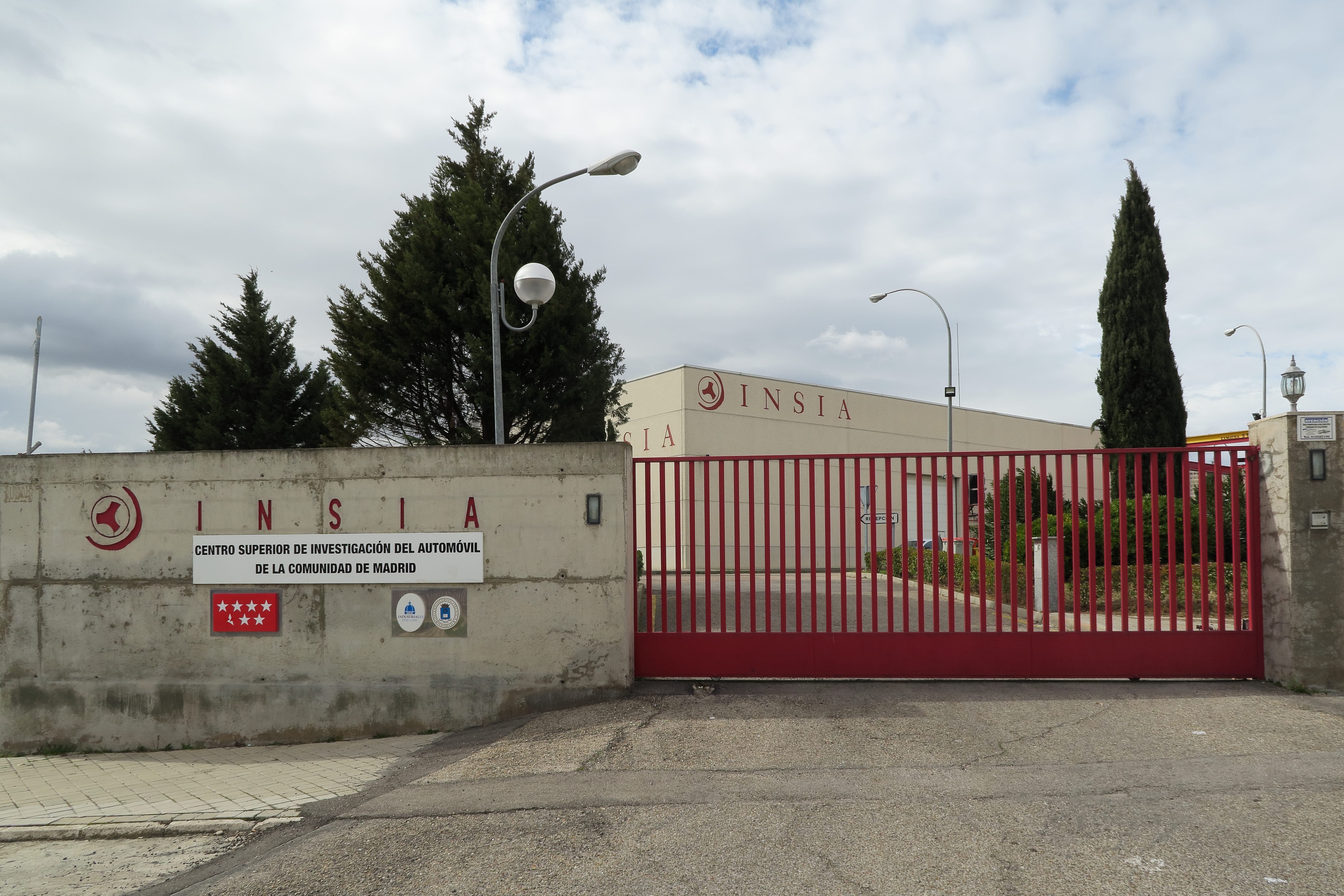 Instituto de Investigación del Automóvil (Universidad Politécnica de Madrid)